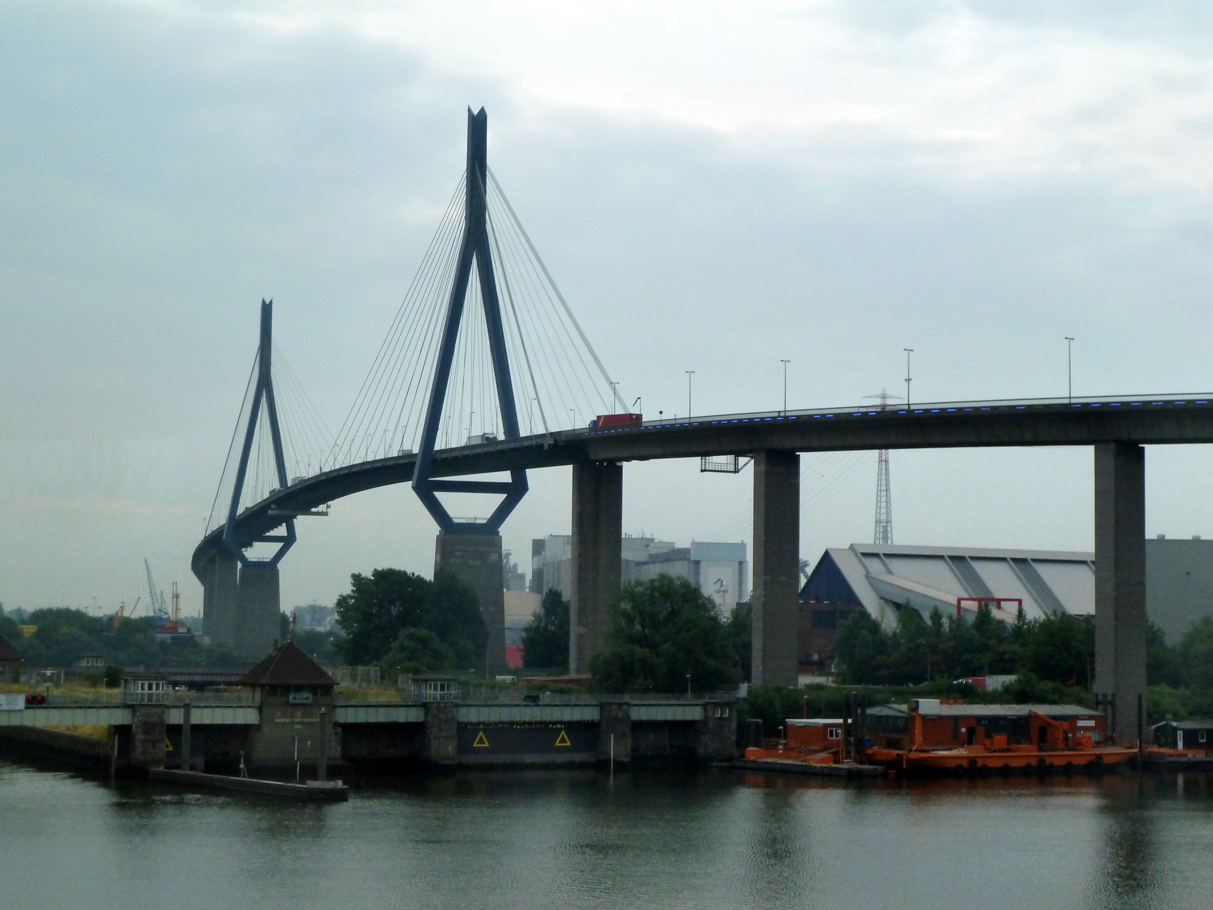 2010-08-28 - Hamburg - Die Köhlbrandbrücke über die Elbe